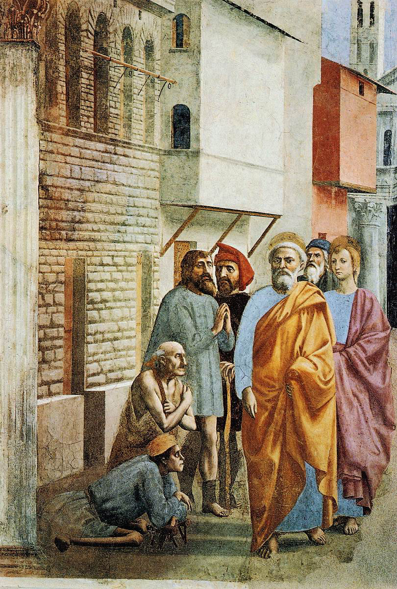 (restaurato)